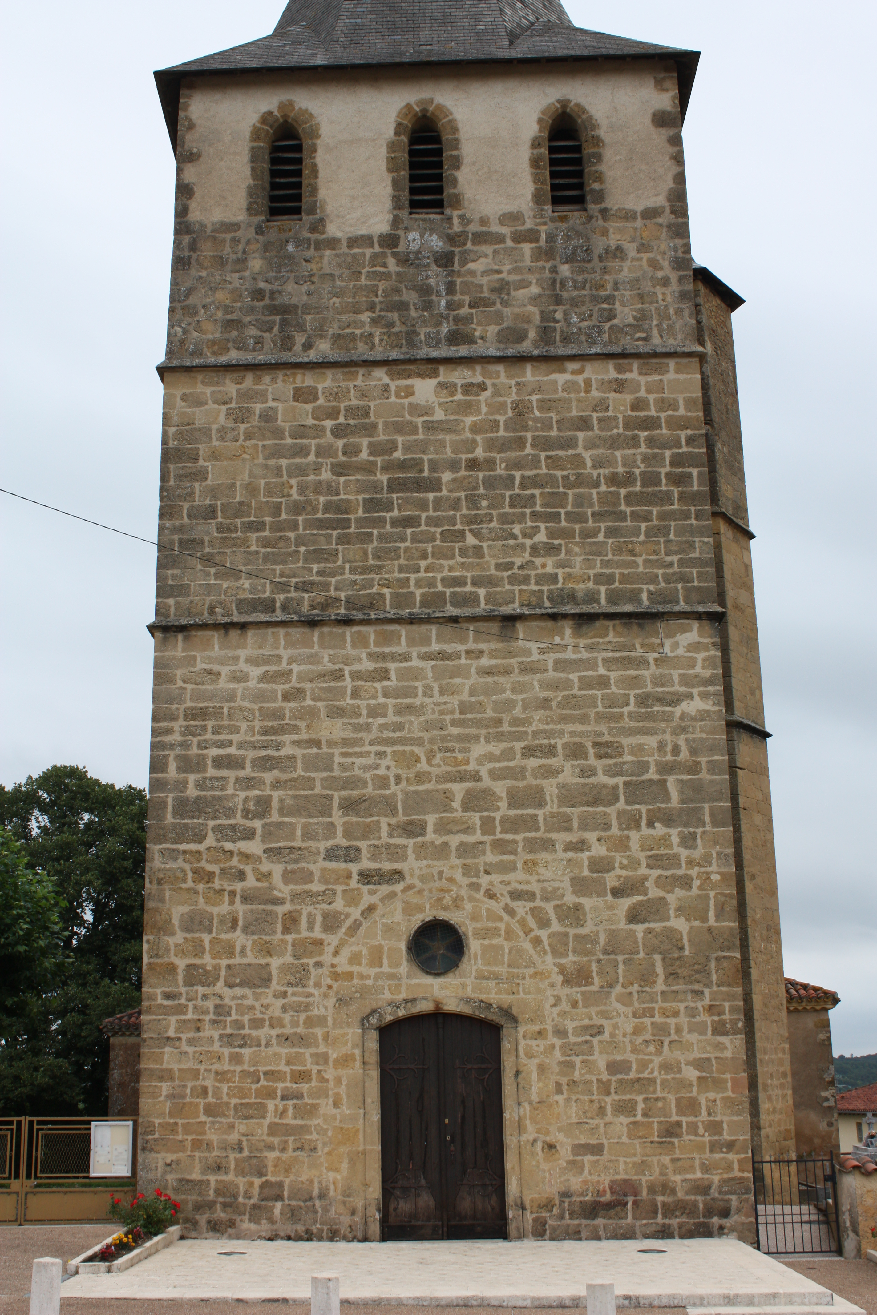 Aux - Eglise Saint-Jacques Façade Ouest